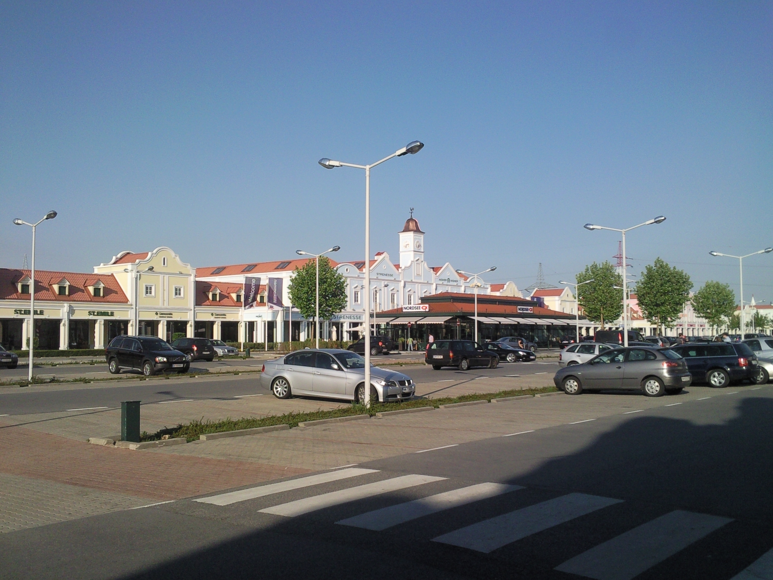 Parndorf